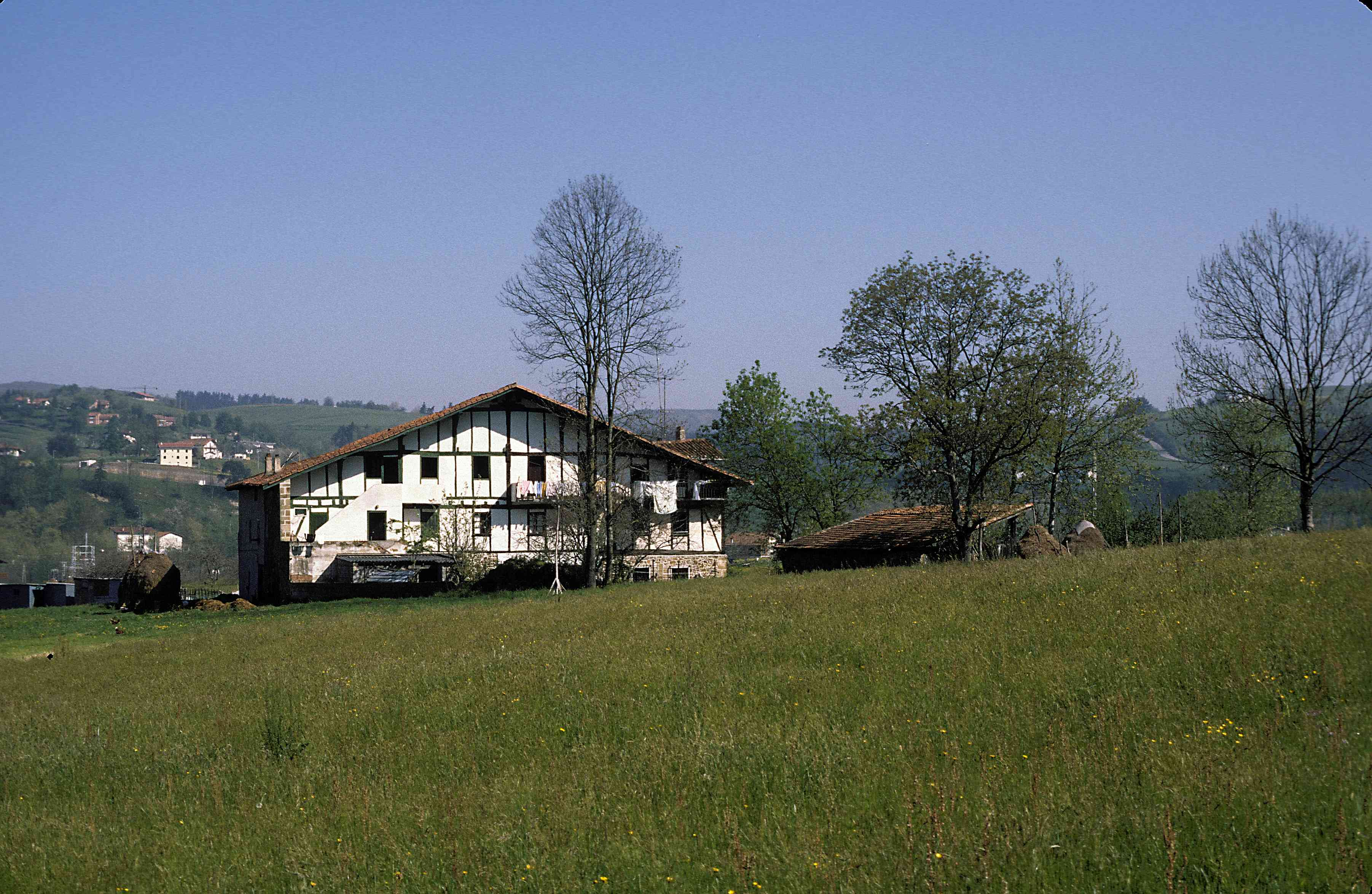 Lertxundi baserria (Zubieta, Gipuzkoa). Eraikitako euskal ondare nabaria izendatua.